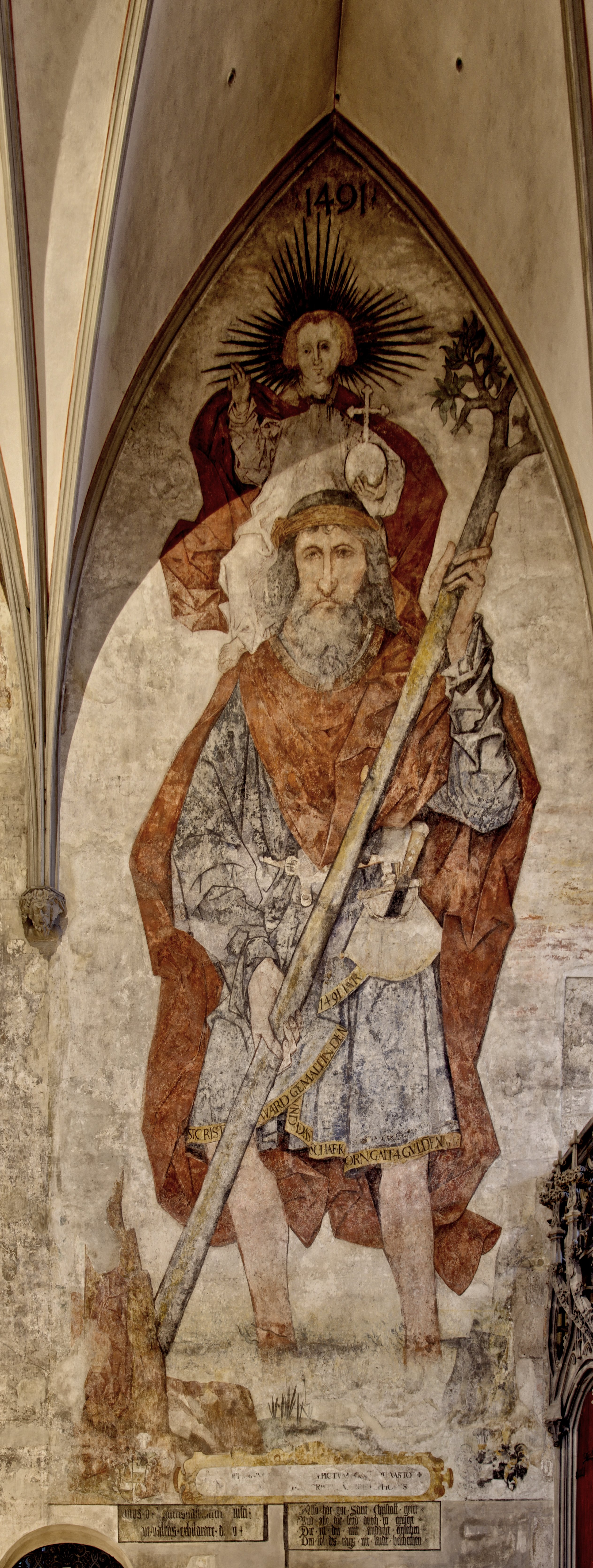 Bilder aus dem Augsburger Dom